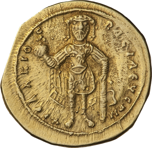 Номисма тетартерон. Исаак I Комнин. Ок. 1057—1059 гг. (реверс). Фигура Исаака I в рост, в фас; на голове корона, император облачен в доспехи; в правой руке держава с крестом, левой опирается на меч. В ободке.